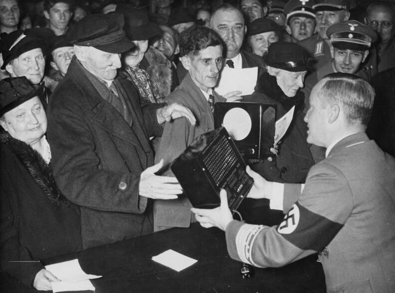 Zum Geburtstag des Reichsministers Dr. Goebbels fand im Funkhaus die Verteilung von 500 neuen dtsch. Kleinempfängern an bedürftige Volksgenossen aus dem Gau Berlin statt. Gaupropagandaleiter Wächter verteilt die Empfänger. Fot: Nau 29.10.38